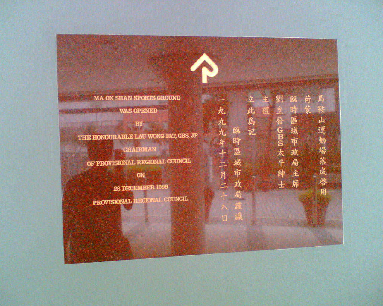 馬鞍山運動場基石